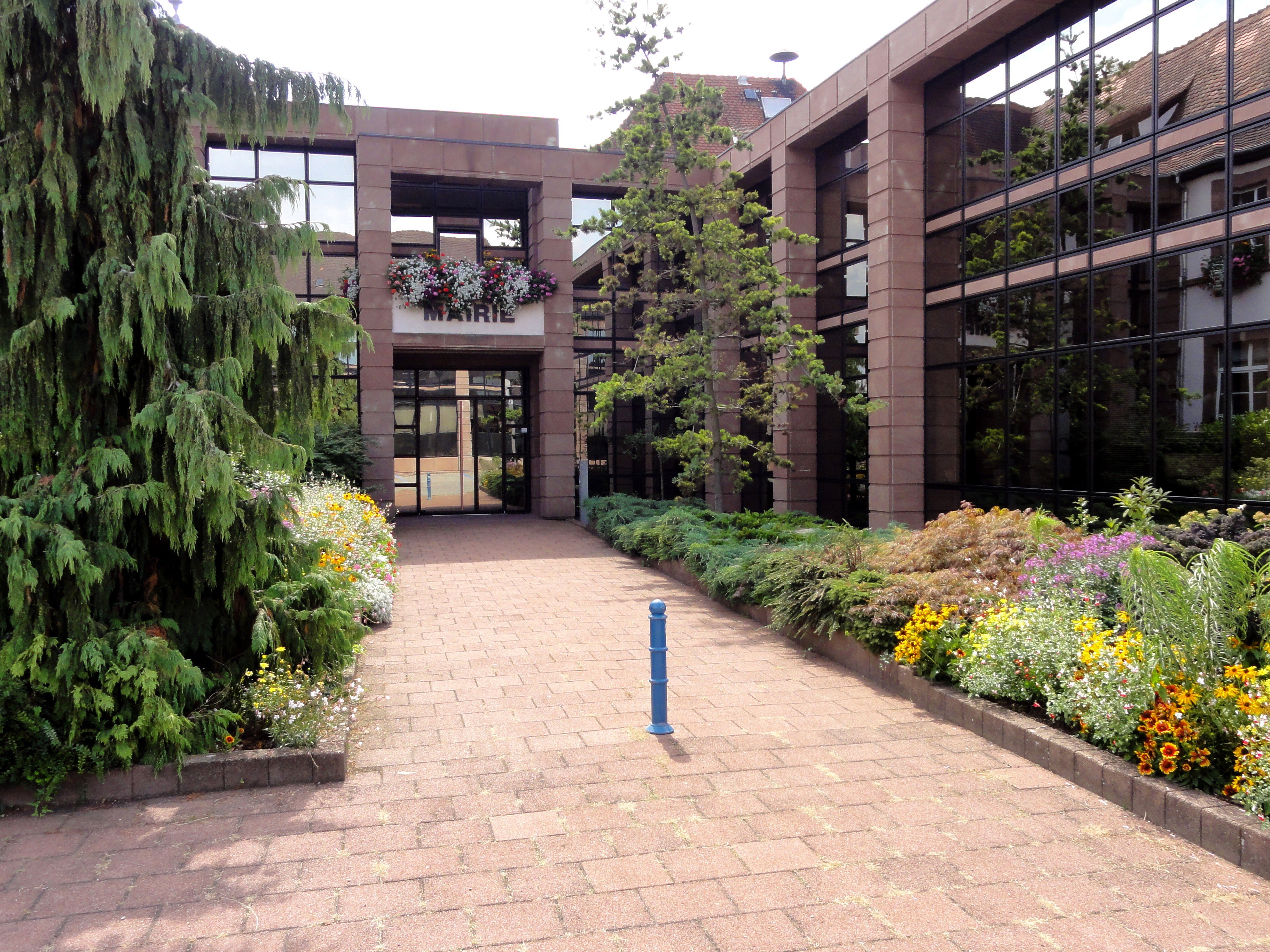 Alsace, Bas-Rhin, Lingolsheim, Hôtel de ville.